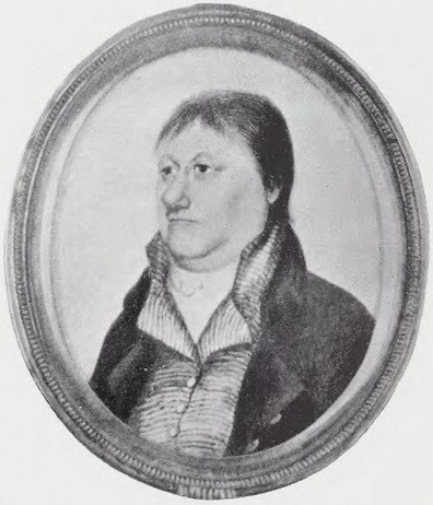 Skipskaptein og reder Salve Olsen Hesnes (f. 1749 i Fjære, d. 1813 i Fjære). Gullinnfattet miniatyr utført i Dublin i juli 1806 av M. Floretti. Per 1960 i privat eie; nå visstnok eid av Aust-Agder museum og arkiv; bedre avfotografering ønsket